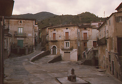 A pochi metri da via dei Cinquecento, è possibile vedere da una angolazione particolare il monte Petrosa quasi a ridosso, e la "mitica" fontana del centro.